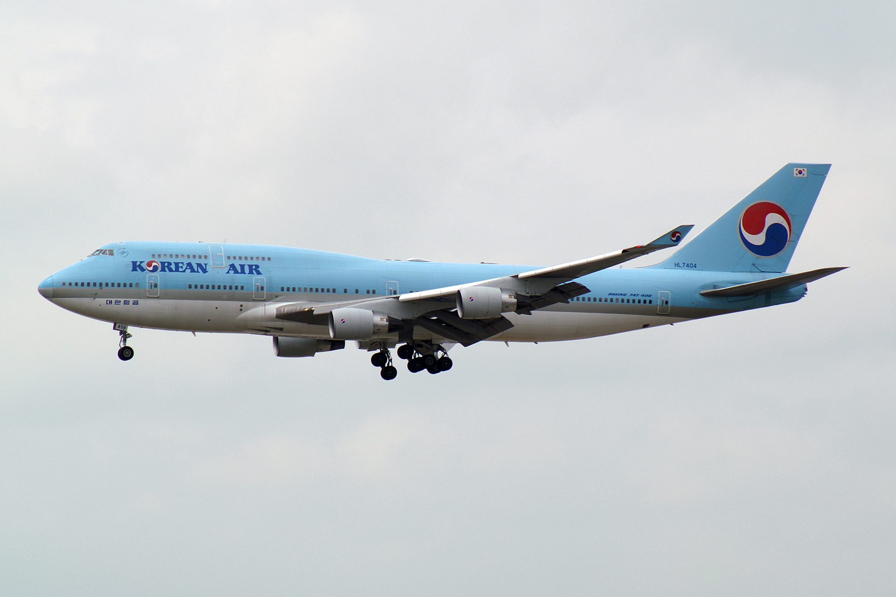 Frankfurt am Main (Rhein-Main AB) (FRA / EDDF / FRF) Germany 7.2005